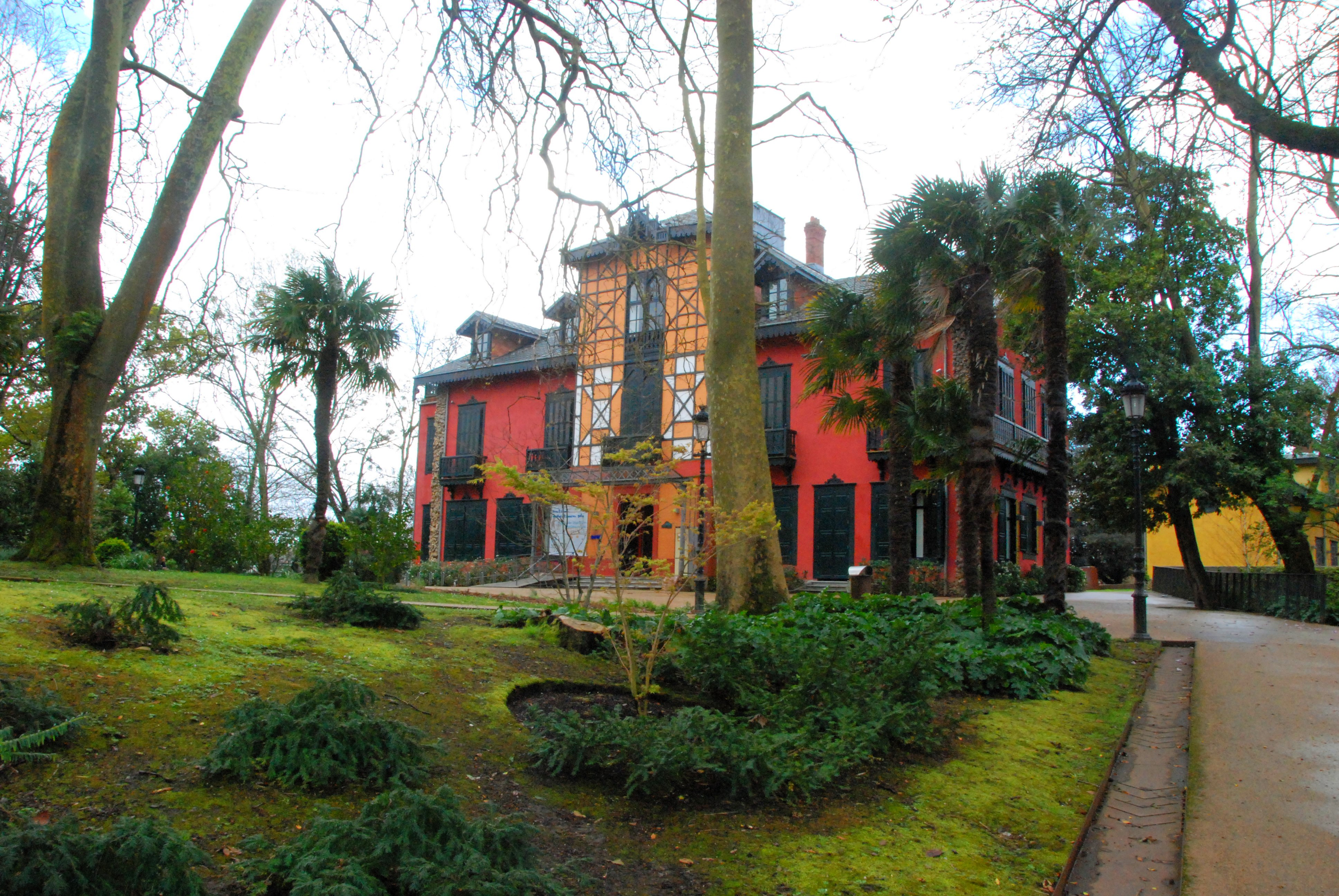 Cristina Enea parkea Donostiako Egia auzoan. Gladys Enea ere deitua.